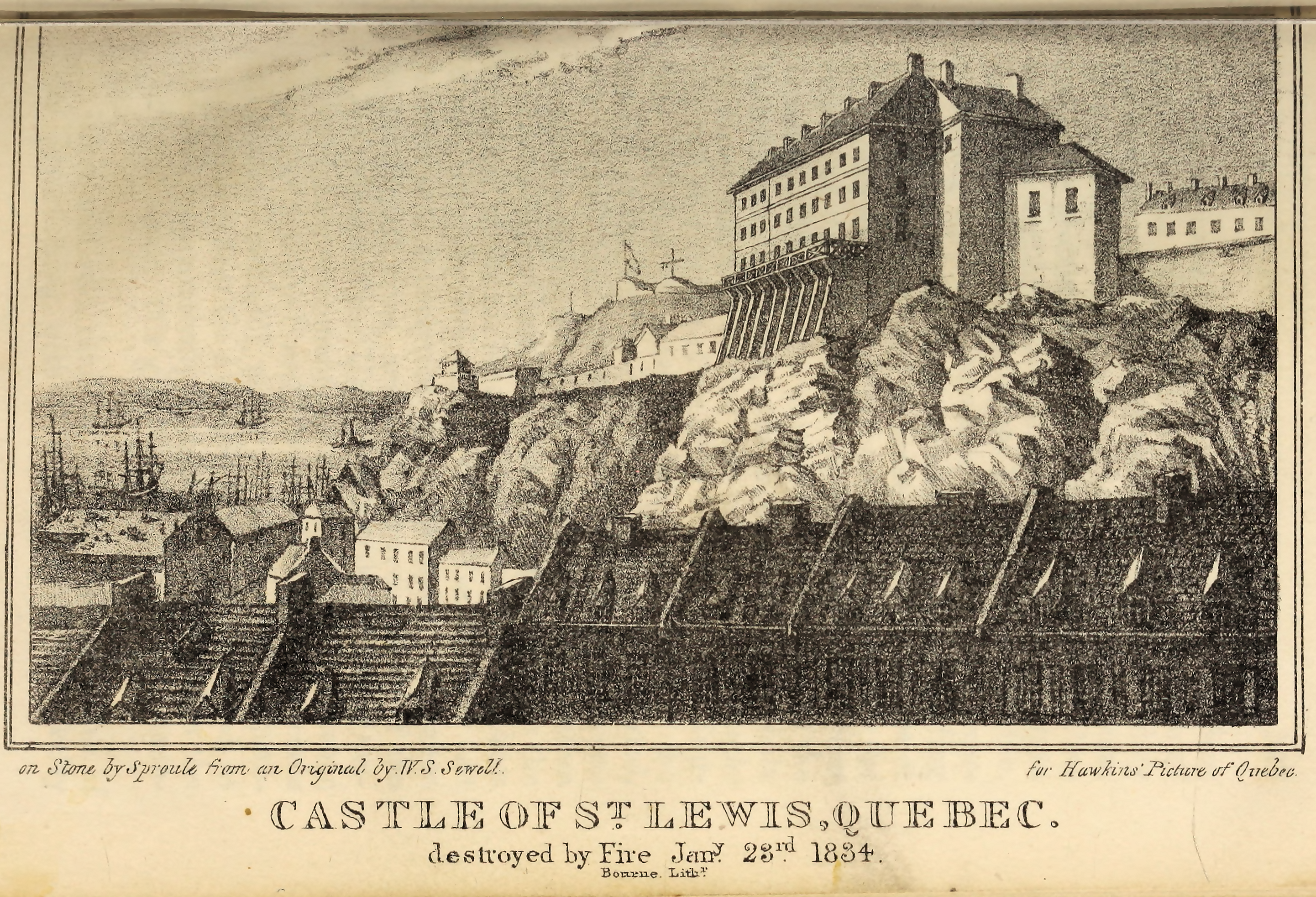 Gravure "Castle of St. Lewis, Quebec", représentant le château Saint-Louis, à Québec. Gravure "on Stone by Sproule from an Original by W.S. Sewell for Hawkin's Picture of Québec". Publiée en 1834 dans le livre Hawkins's Picture of Québec, entre les pages 128 et 129.